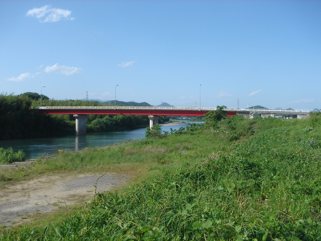 Imagawa Bashi(今川橋 (関市)),Seki,Gifu,Japan(岐阜県関市)で南(下流)より撮影。川は今川(長良川の支流)